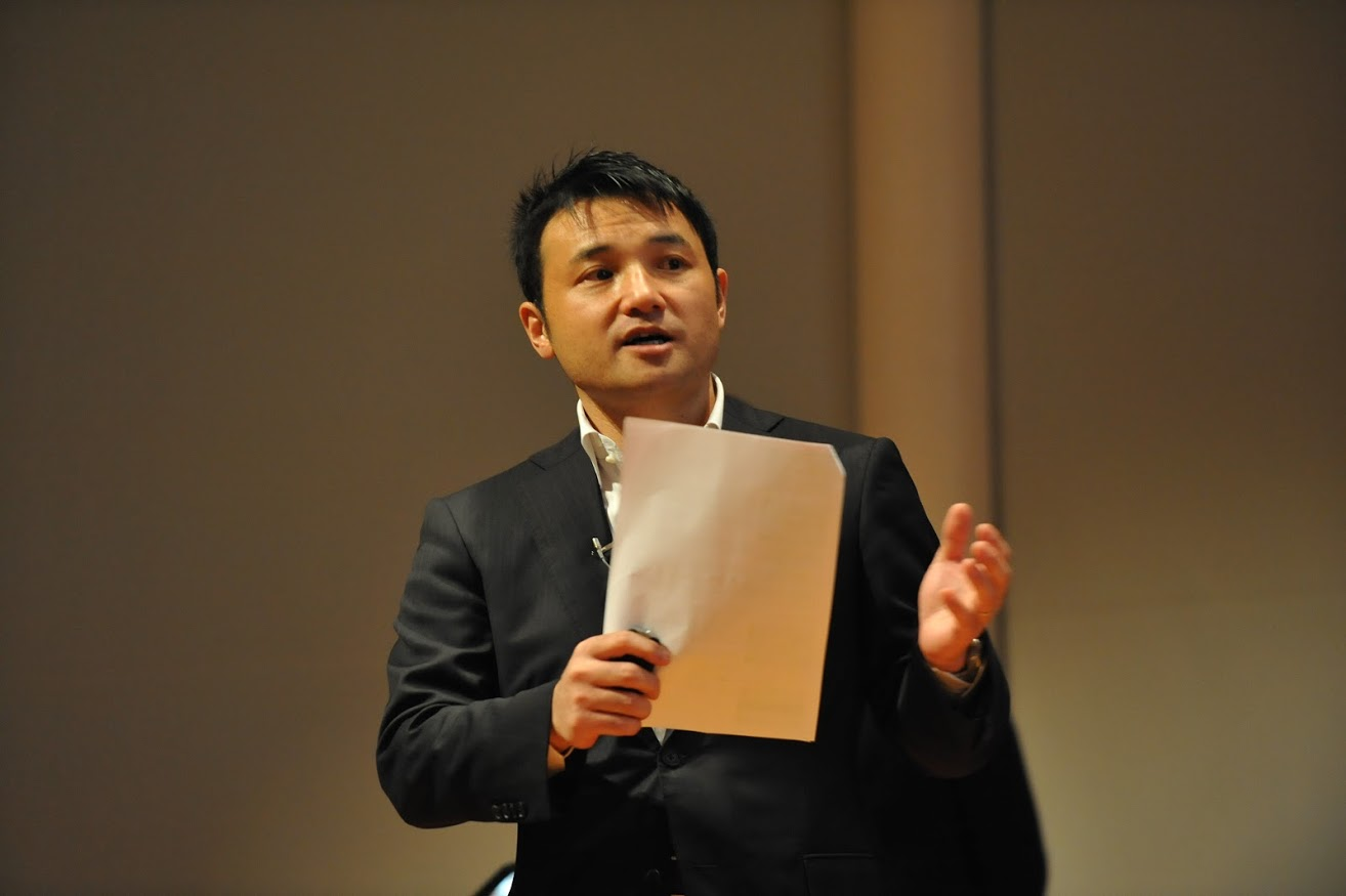 中村司の講演中の写真。